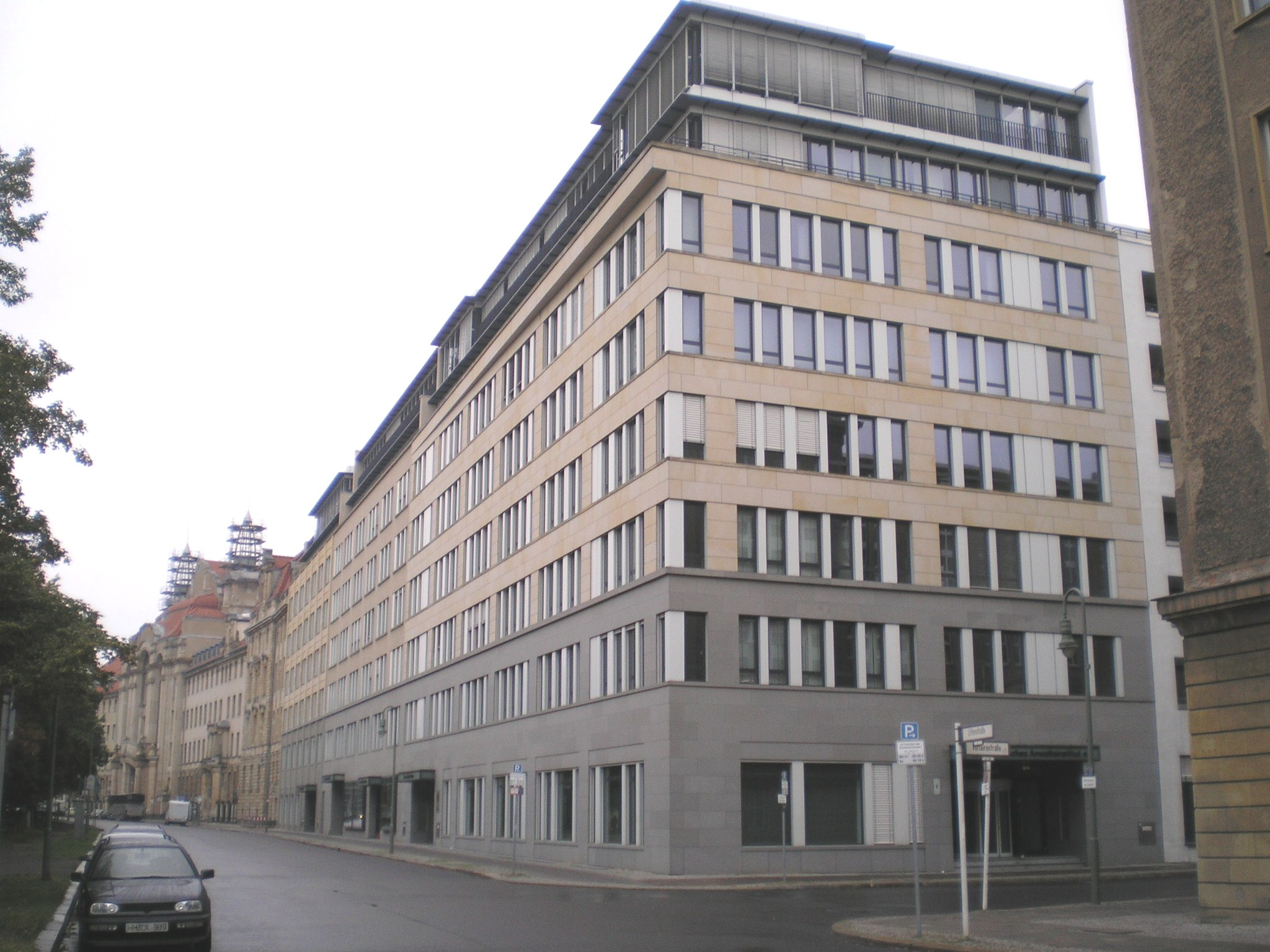 Das Hans- Litten-Haus in der Littenstrasse